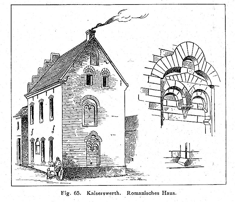 Düsseldorf-Kaiserswerth, Romanisches_Haus Suitbertus-Stiftsplatz 14.jpg